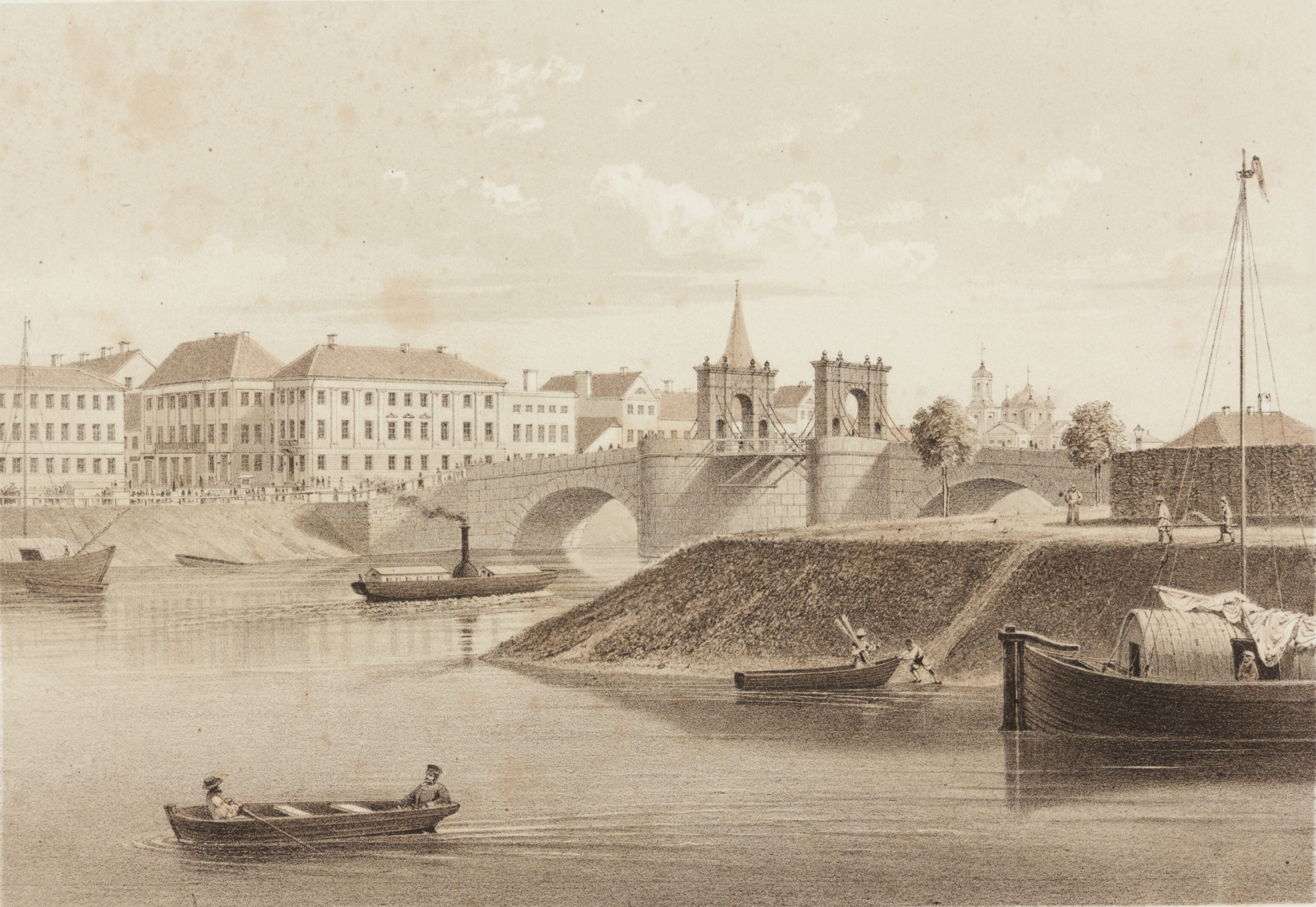 Tartu album. Kivisild. MUIS: TKM TR 4038 H 31:6